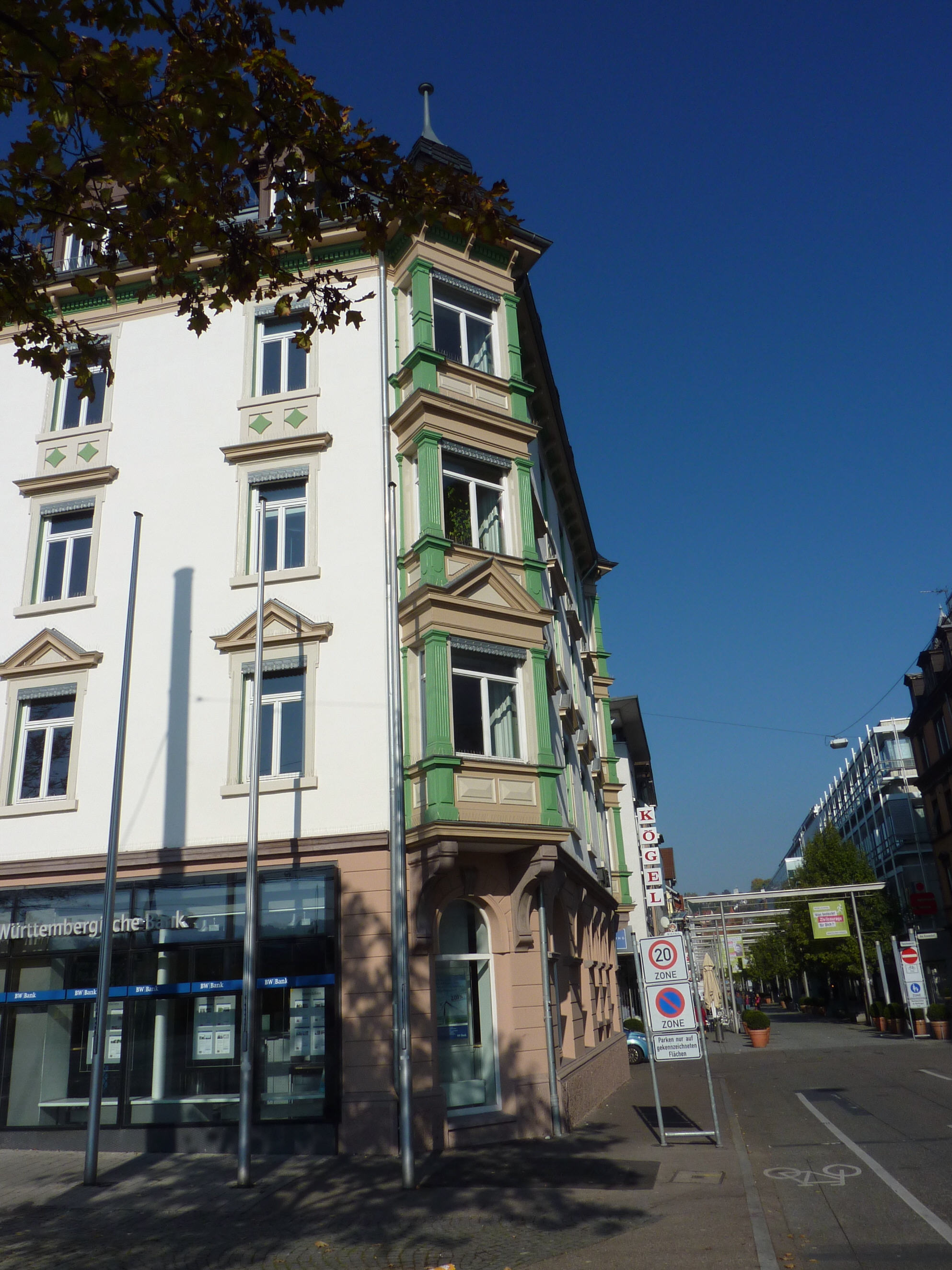 Bahnhofstr. 1, ES